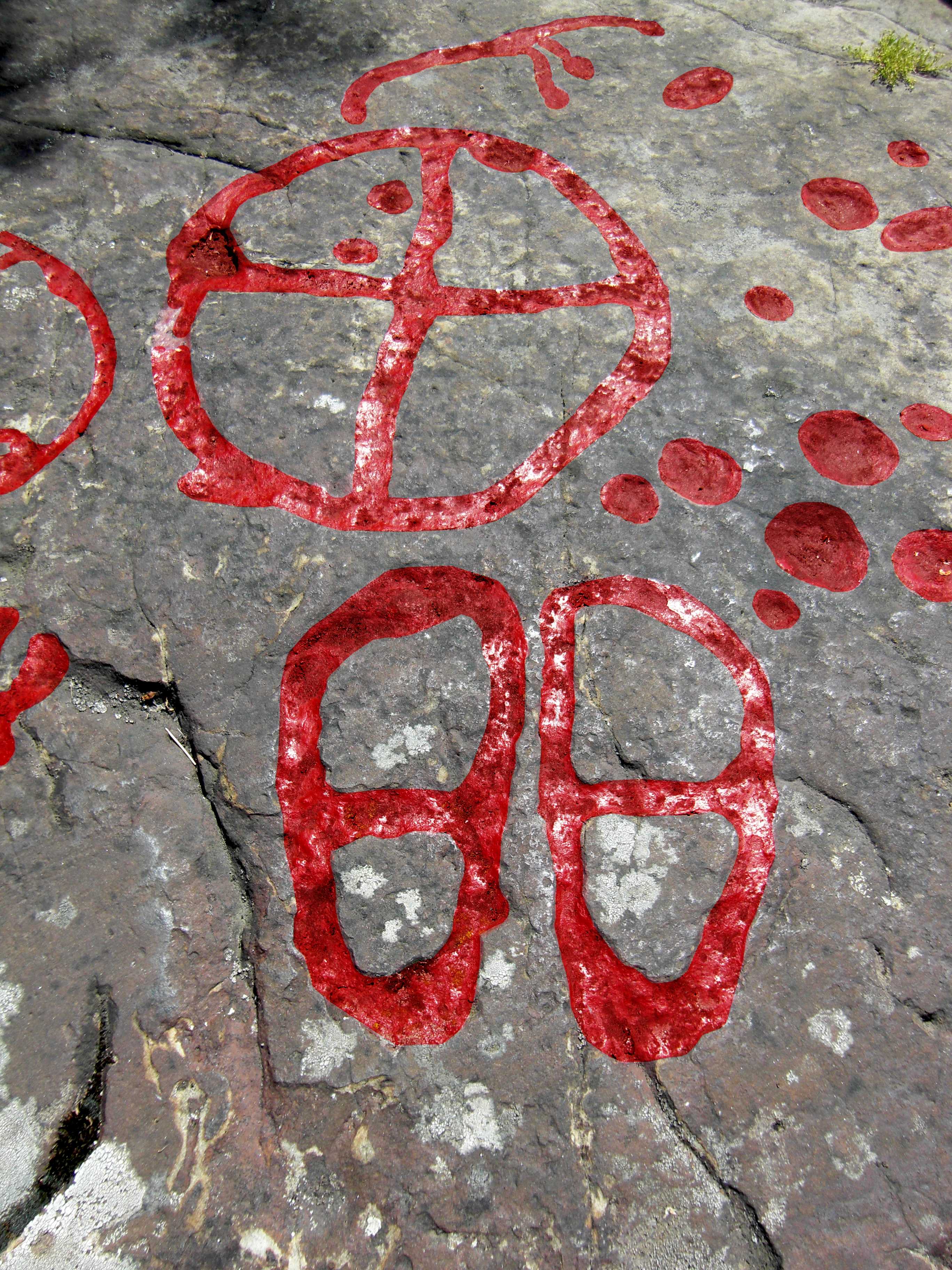 Ett hjulkors och ett par fotsulor på hällristningslokalen Flyhov (Raä-nr Husaby 70:1) i Husaby socken, Kinnefjärdings härad, Götene kommun, f.d. Skaraborgs län, Västergötland, Västra Götaland, Sverige. På fotot är hällristningarnas imålning förstärkt i Photoshop.